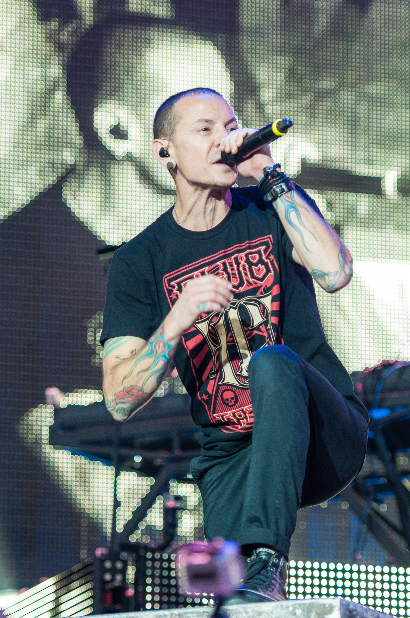 ARGO-Konzerte,Centerstage,Chester Bennington,Konzert,Linkin Park,Livekonzert,Livemusik,Musik,RiP,Rock im Park 2014